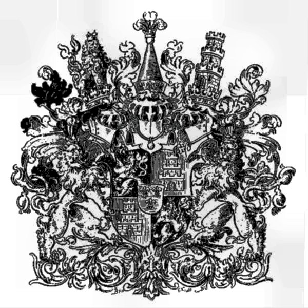 Gräfliches Wappen der Familie Vetter von der Lilie